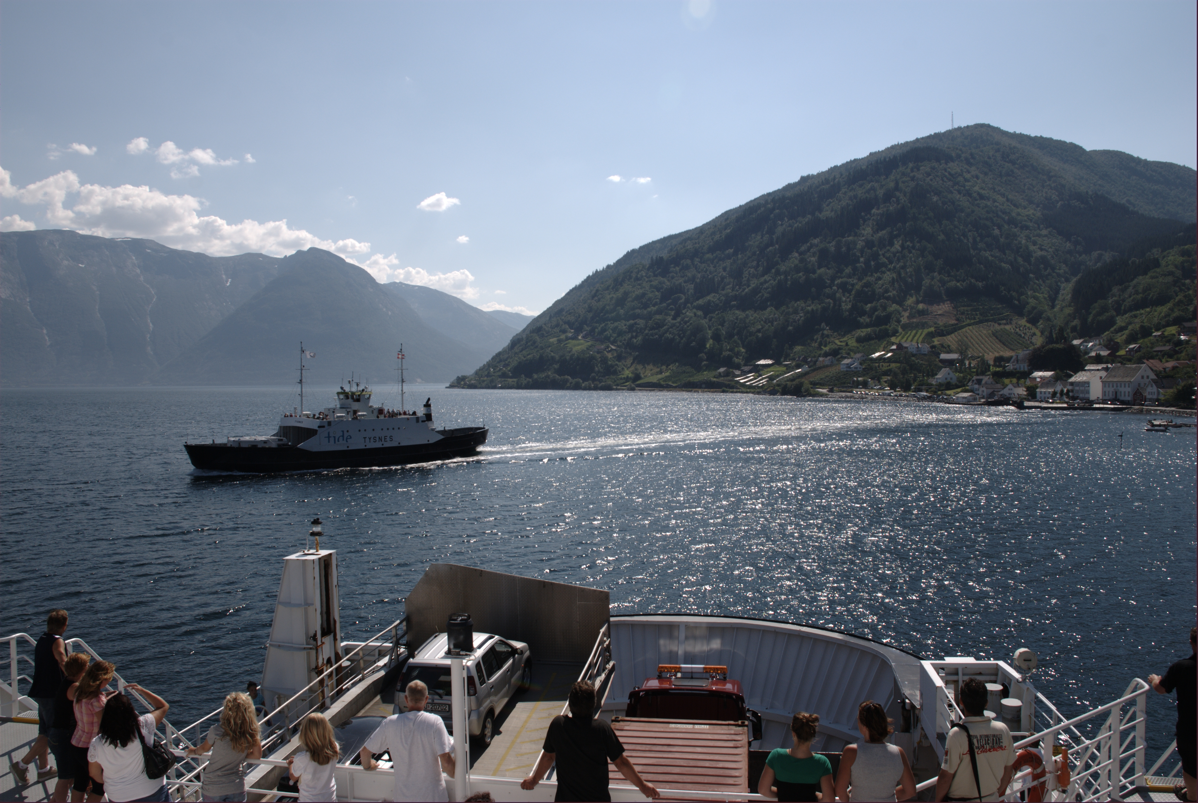 Utsikt mot Utne frå øvre dekk på M/F Hardingen, M/F Tysnes har akkurat gått frå kai på Utne, på tur til Kvanndal. Utnefjorden, ein del av Hardangerfjorden.